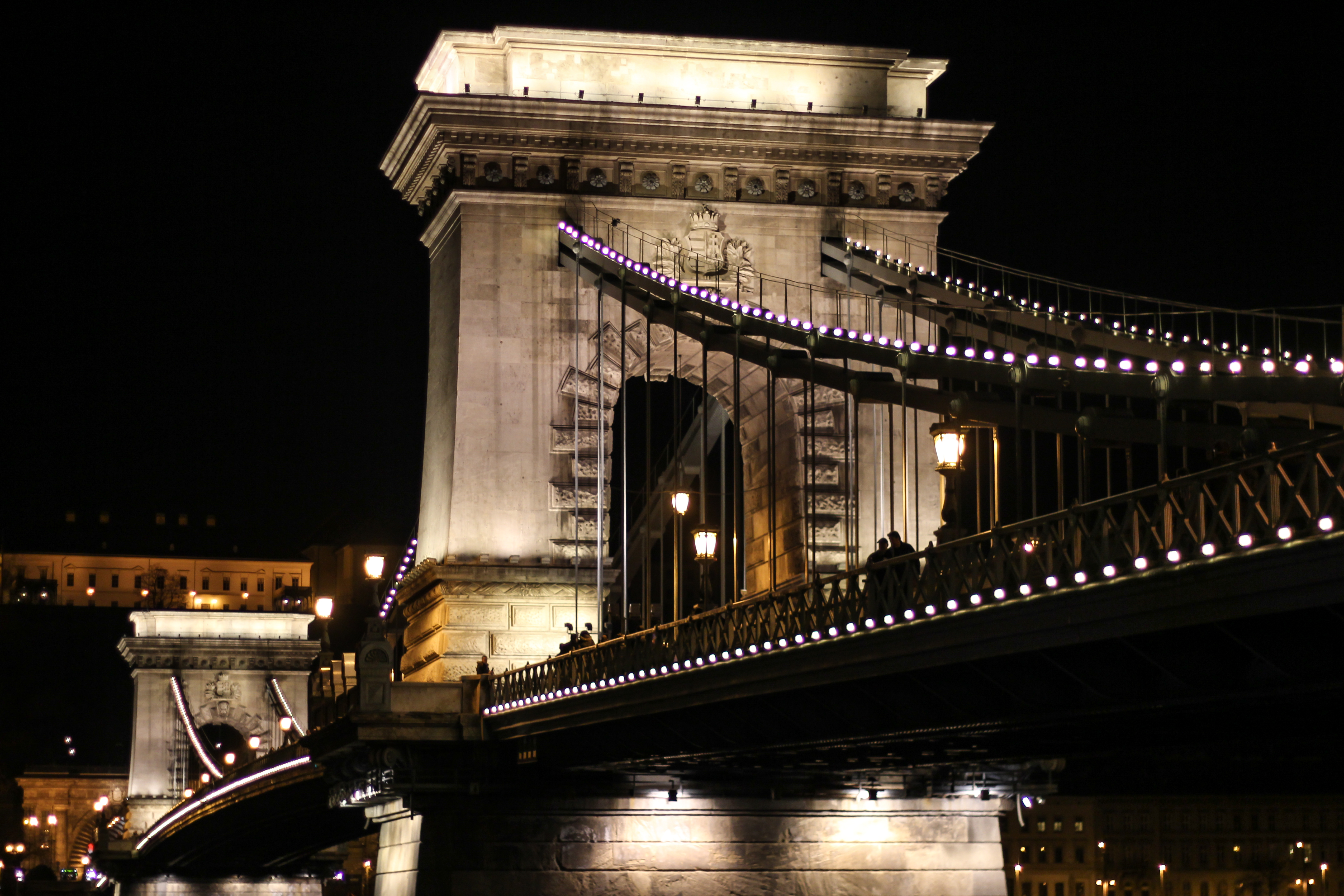 A kivilágított Széchenyi lánchíd Budapest